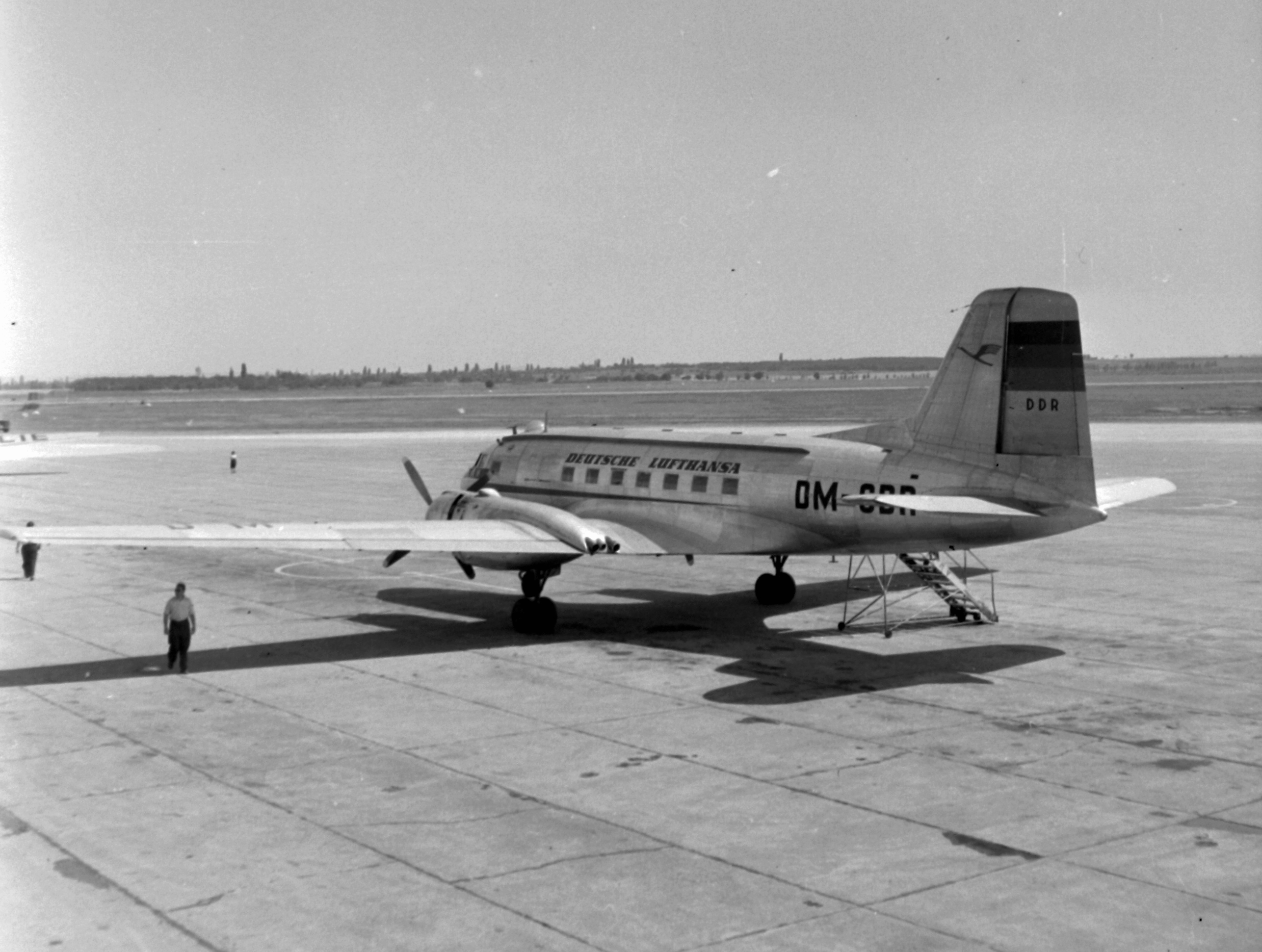 Barth repülőtér. IL-14P/T típusú légcsavaros repülőgép. Location: Germany Tags: airplane, airport, GDR, transport, Soviet brand Title: Barth repülőtér. IL-14P/T típusú légcsavaros repülőgép.